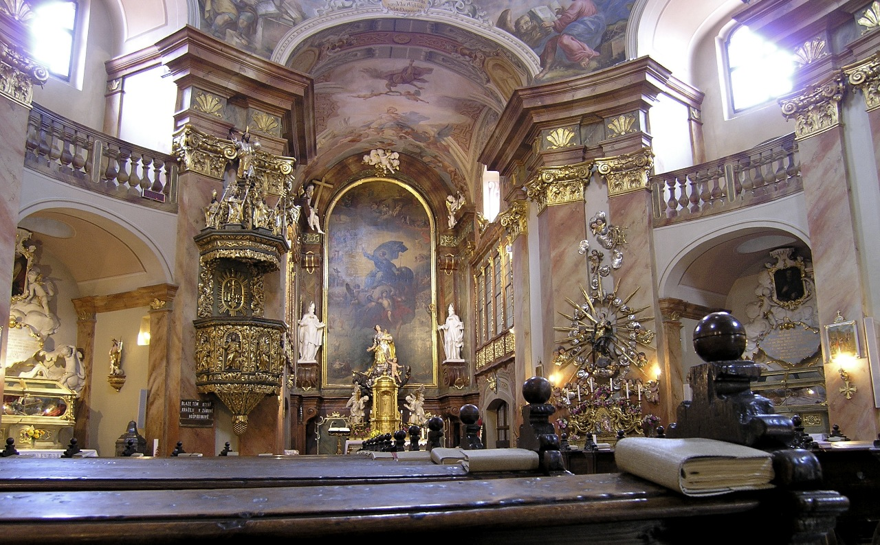 Interiér chrámové lodi Sv.Markéty v Jaroměřicích n/Rokytnou